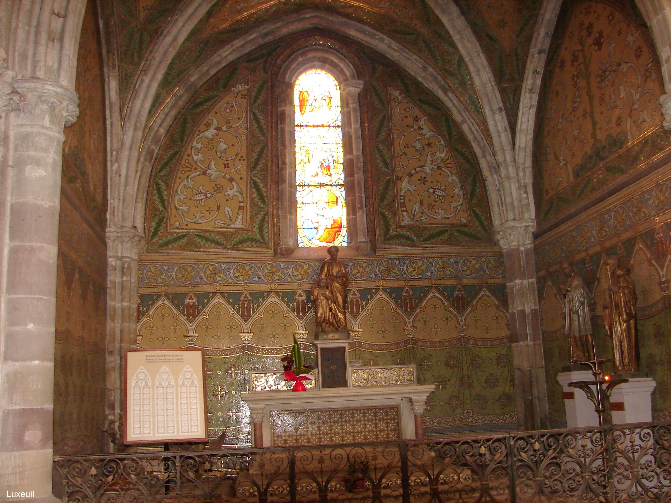 Vue générale d'une crypte avec des décors mosaïques réalisés en 1898 par Henri Bichi avec des émaux de Briare